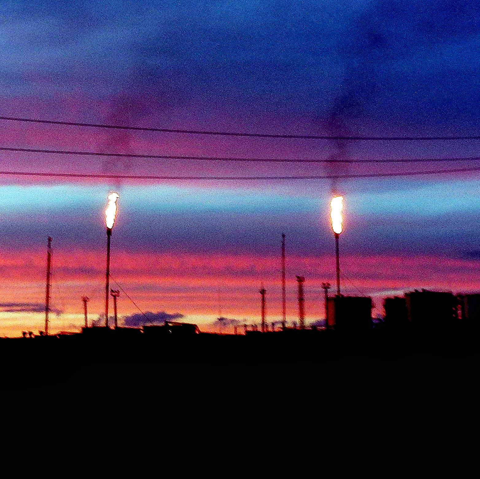 Нефтепромысел №2 ОАО АНК Башнефть. Мухаметдиново